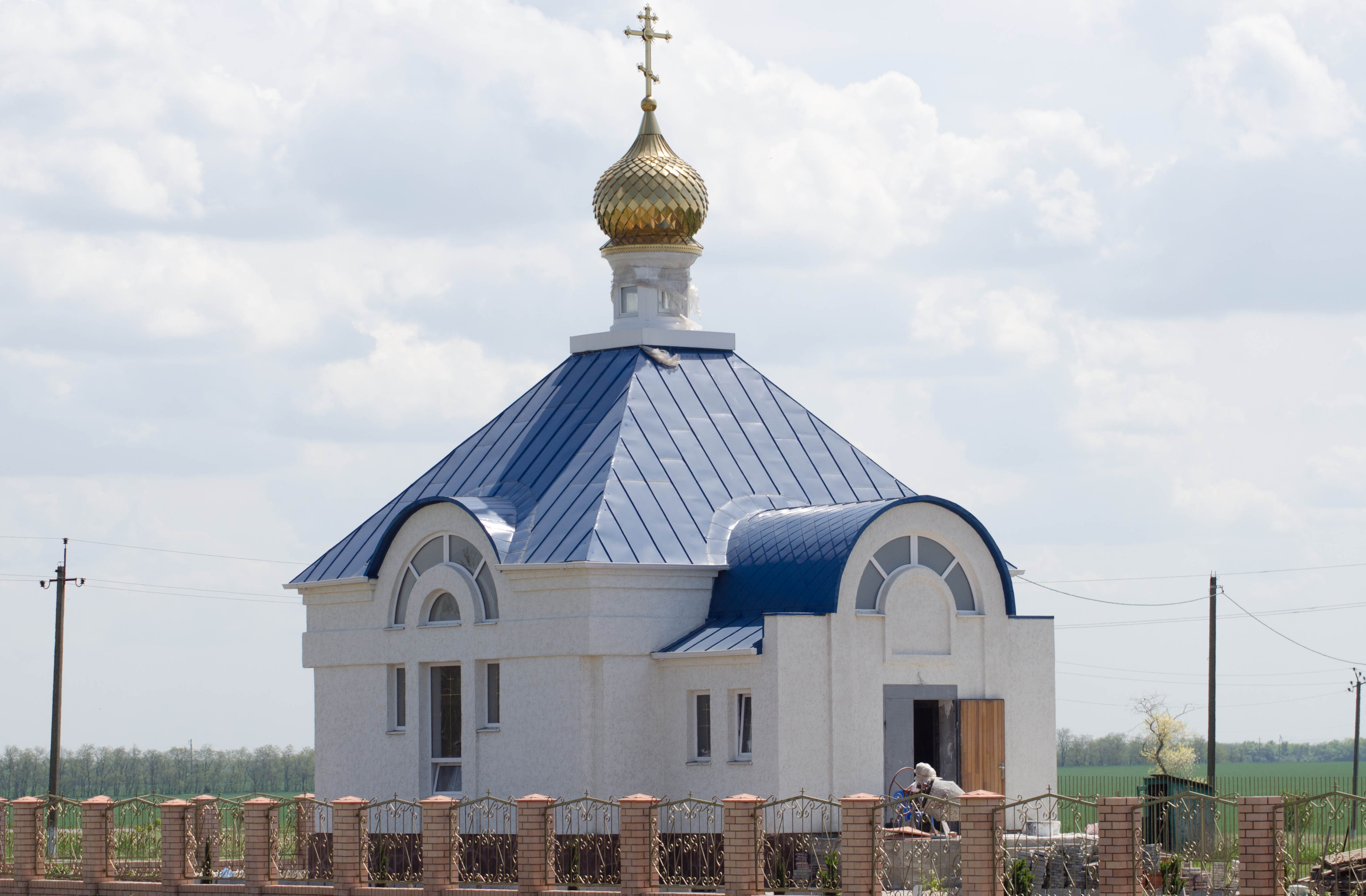 Церковь в Воронцовке